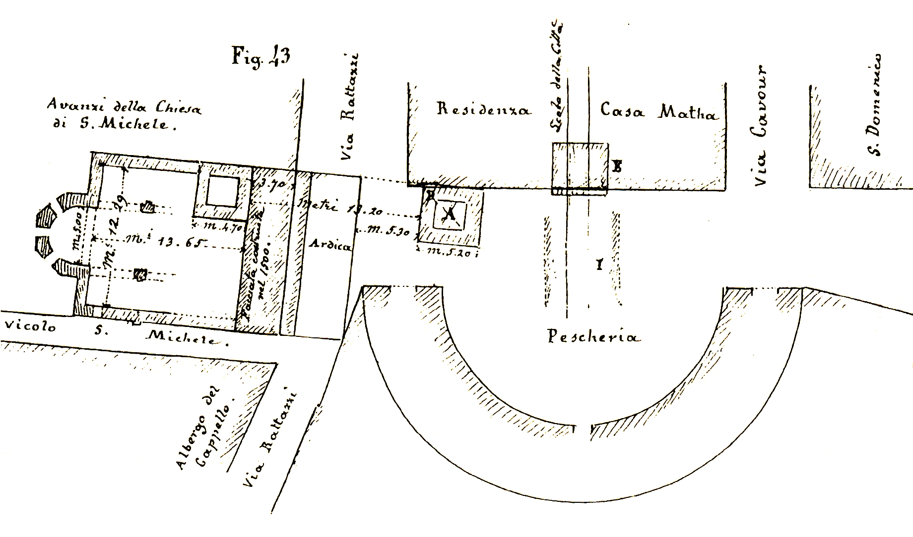 Pianta elaborata durante gli scavi avvenuti nel 1901 nell'area della Casa Matha.